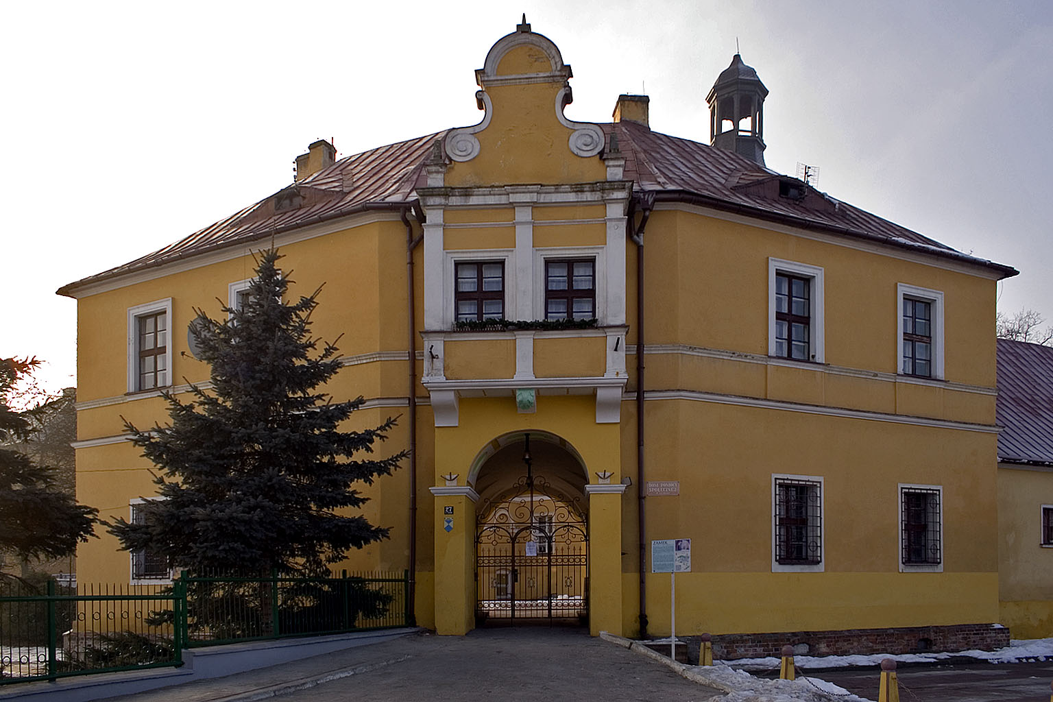 Lubsko - zamek, obecnie Dom Pomocy Społecznej